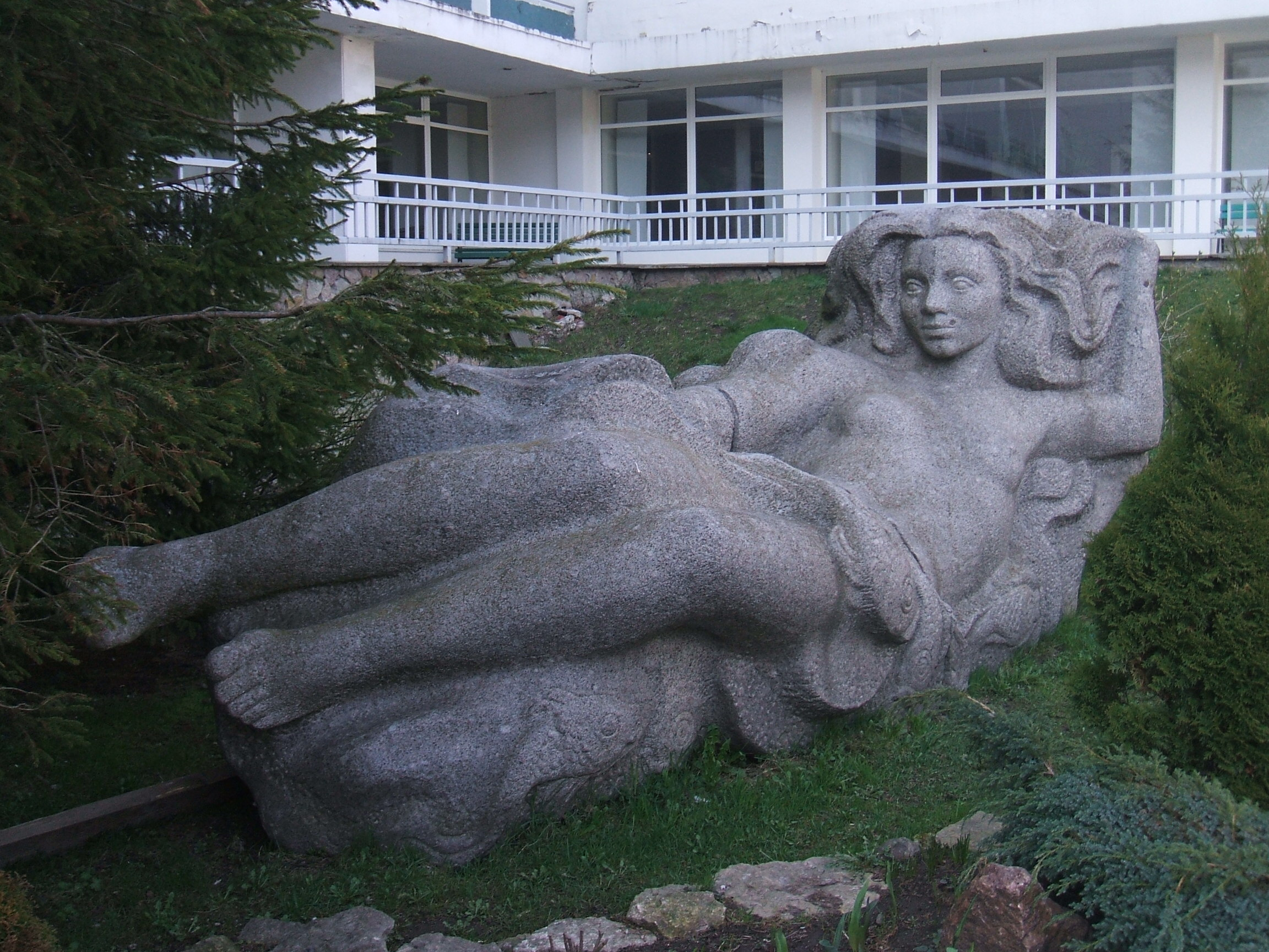 Сестрорецк СПб. Библиотека санатория Сесторецкого Курорта